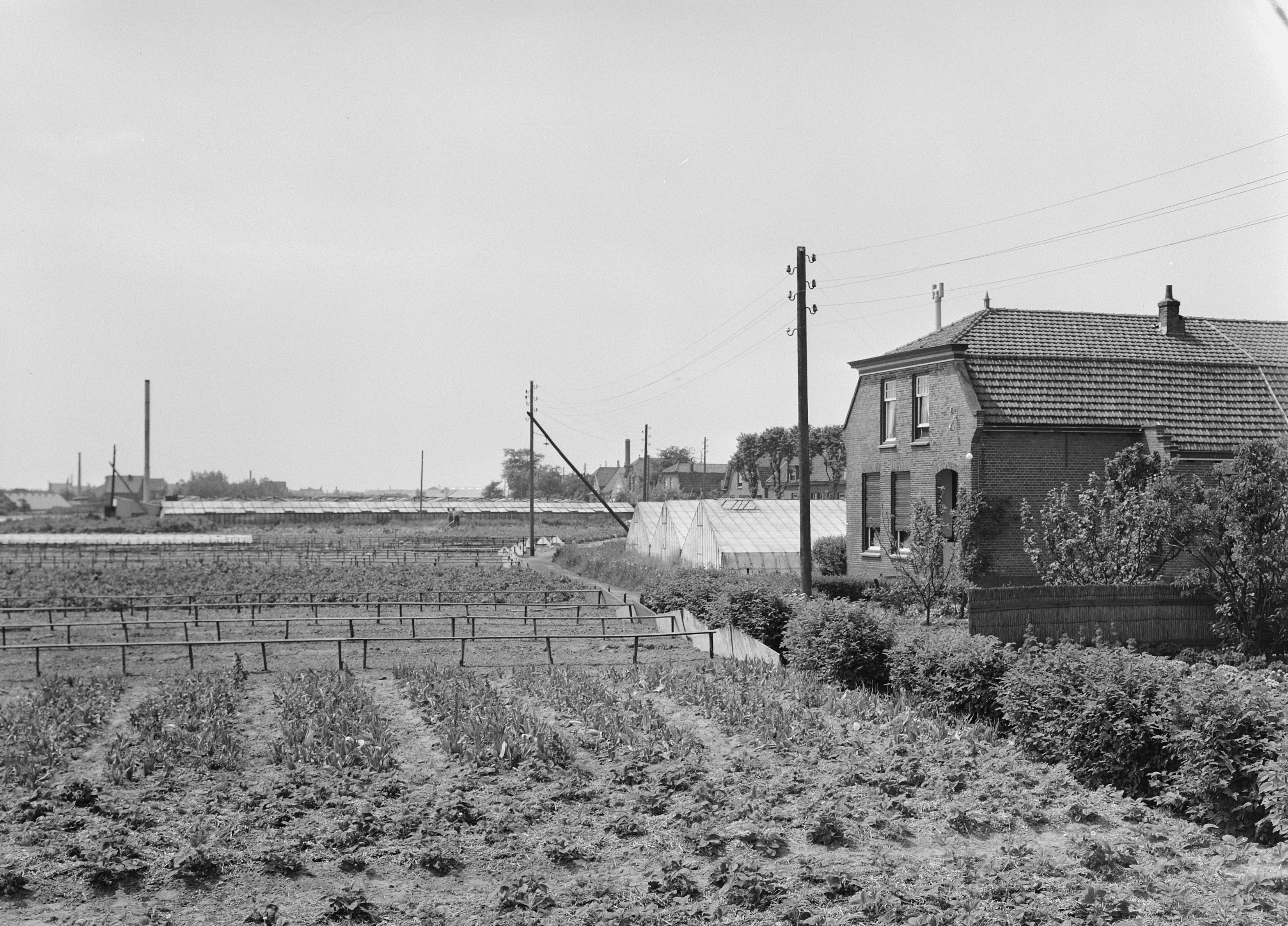 Collectie / Archief : Fotocollectie Nederlandse Heidemaatschappij Reportage / Serie : [ onbekend ] Beschrijving : Tuinbouw in De Lier (Westland) Datum : juli 1958 Locatie : De Lier, Westland Trefwoorden : landschappen, tuinbouw Fotograaf : [onbekend] Auteursrechthebbende : Nationaal Archief Materiaalsoort : Negatief (zwart/wit) Nummer archiefinventaris : bekijk toegang 2.24.06.02 Bestanddeelnummer : 164-0225 Reacties Geplaatst door Aad Vijverberg op 06 januari 2008 - 17:36. Rechts, achter het woonhuis, drie druivenserres.Links bakken voor platglas glas niet aanwezig). Op de achtergrond Westlands warenhuis. Let op smalle ontsluingspad en bovengrondse electriciteitskabels.